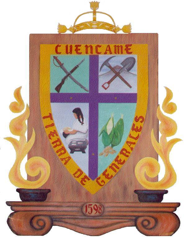 Escudo de Armas del Municipio de Cuencamé, estado de Durango, México.